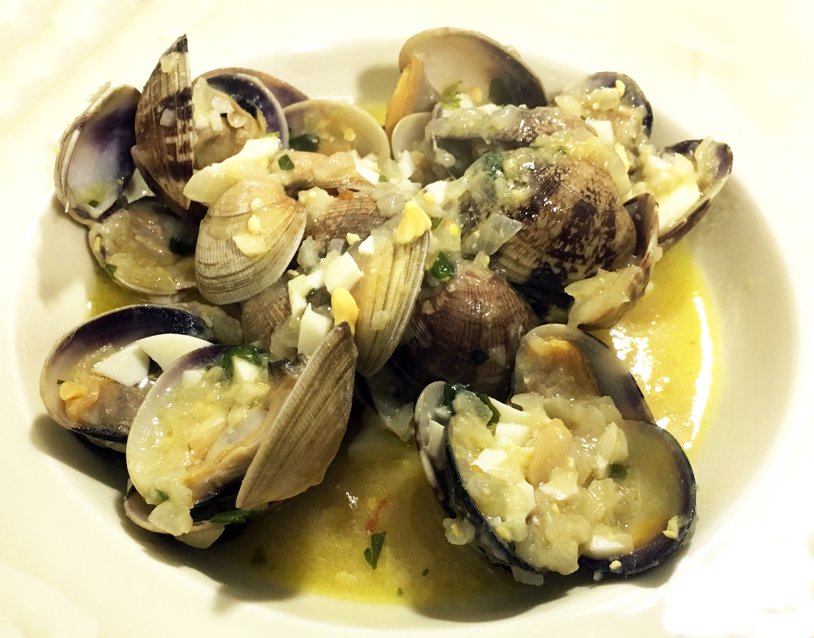 Amasueles, almejas, salsa